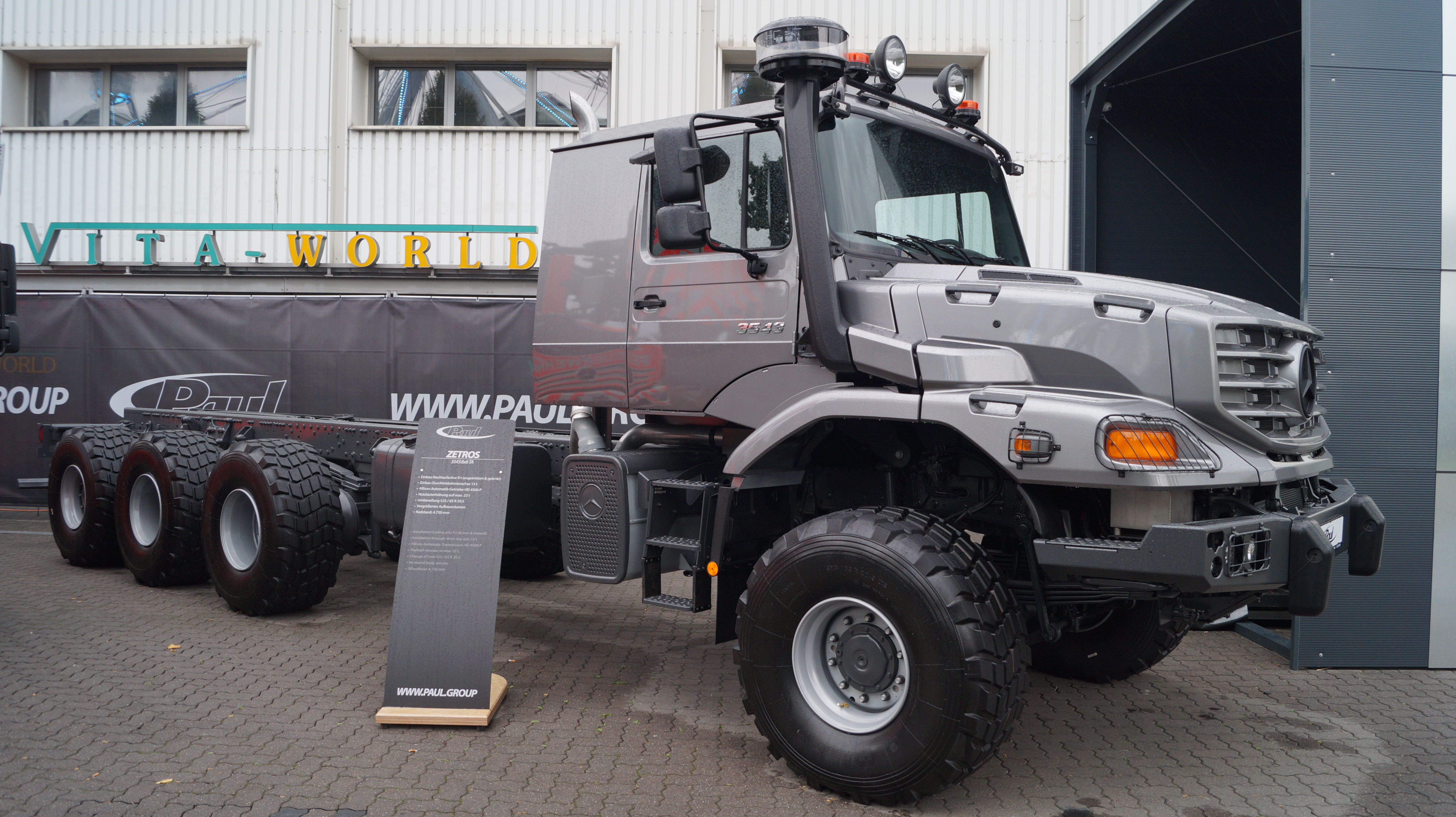 Schrägansicht der Front eines Paul Zetros 3543 8x8 TA, ausgestellt auf der IAA 2018.